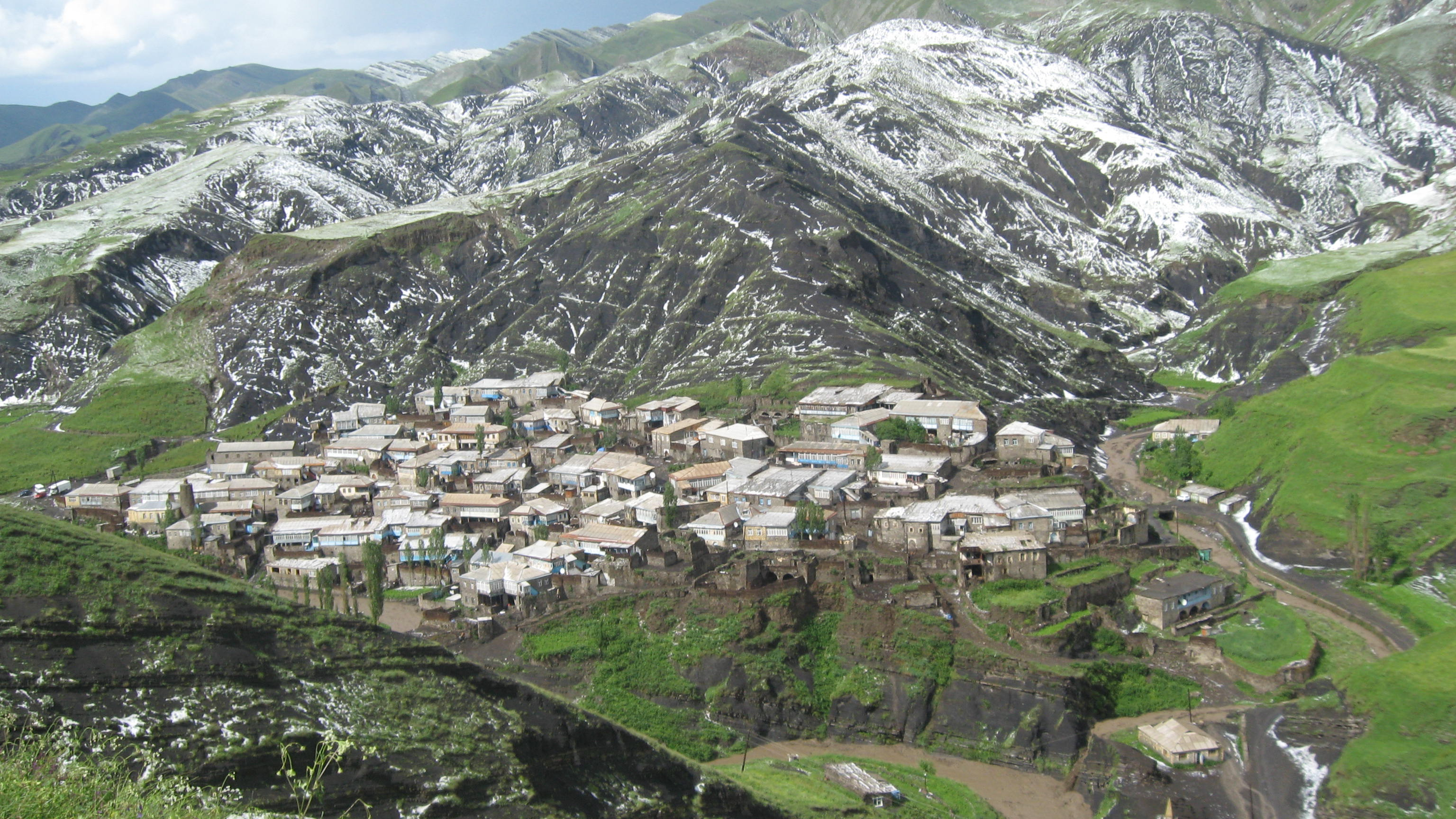 Дагестан. Селение Кураг в Агульском районе